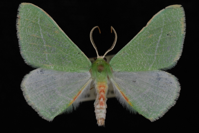 Chlorosea roseitacta